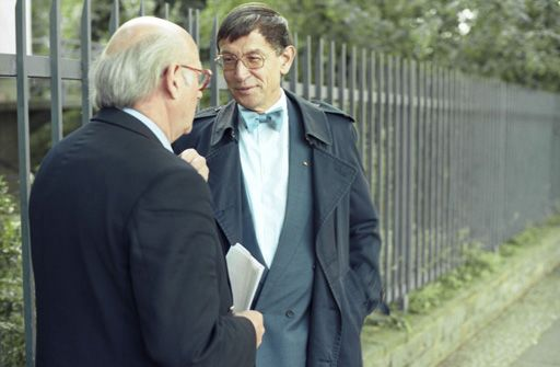 Der Bundestagsabgeordnete Heinz Riesenhuber im Gespräch am Zaun des Bundeskanzleramtes. Innenansichten unseres Parlaments. Impressionen während der Parlamentarischen Woche im Juni 1995 in: Der Dreizehnte Deutsche Bundestag. Innenansichten unseres Parlaments. ISBN 3-87576-357-2. Seite 132